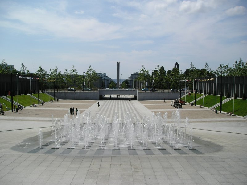 Plasenn ar frankiz